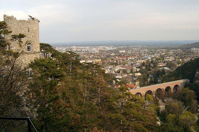 Mödling Gesamtansicht, im Vorgrund der Schwarze Turm und das Aquädukt der ersten Wiener Hochquellenwasserleitung.